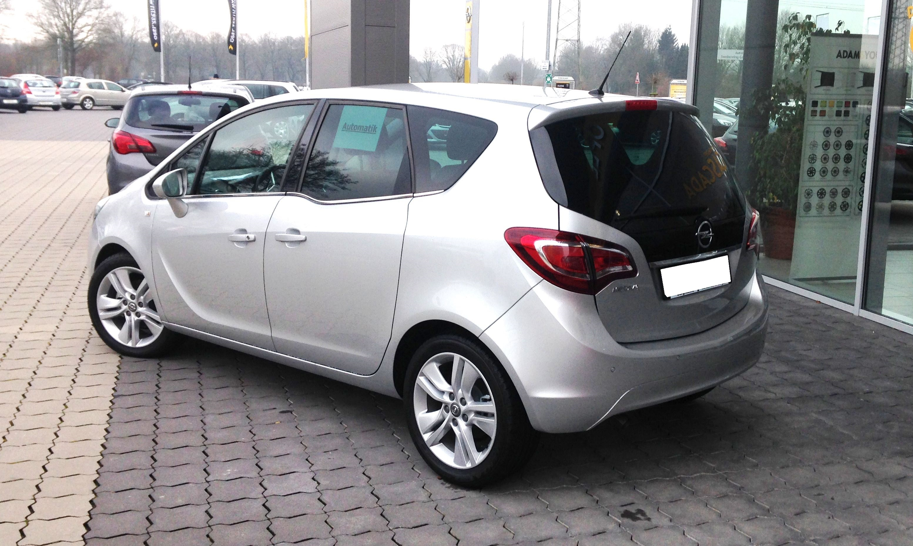 Opel Meriva B (Facelift) - Heck